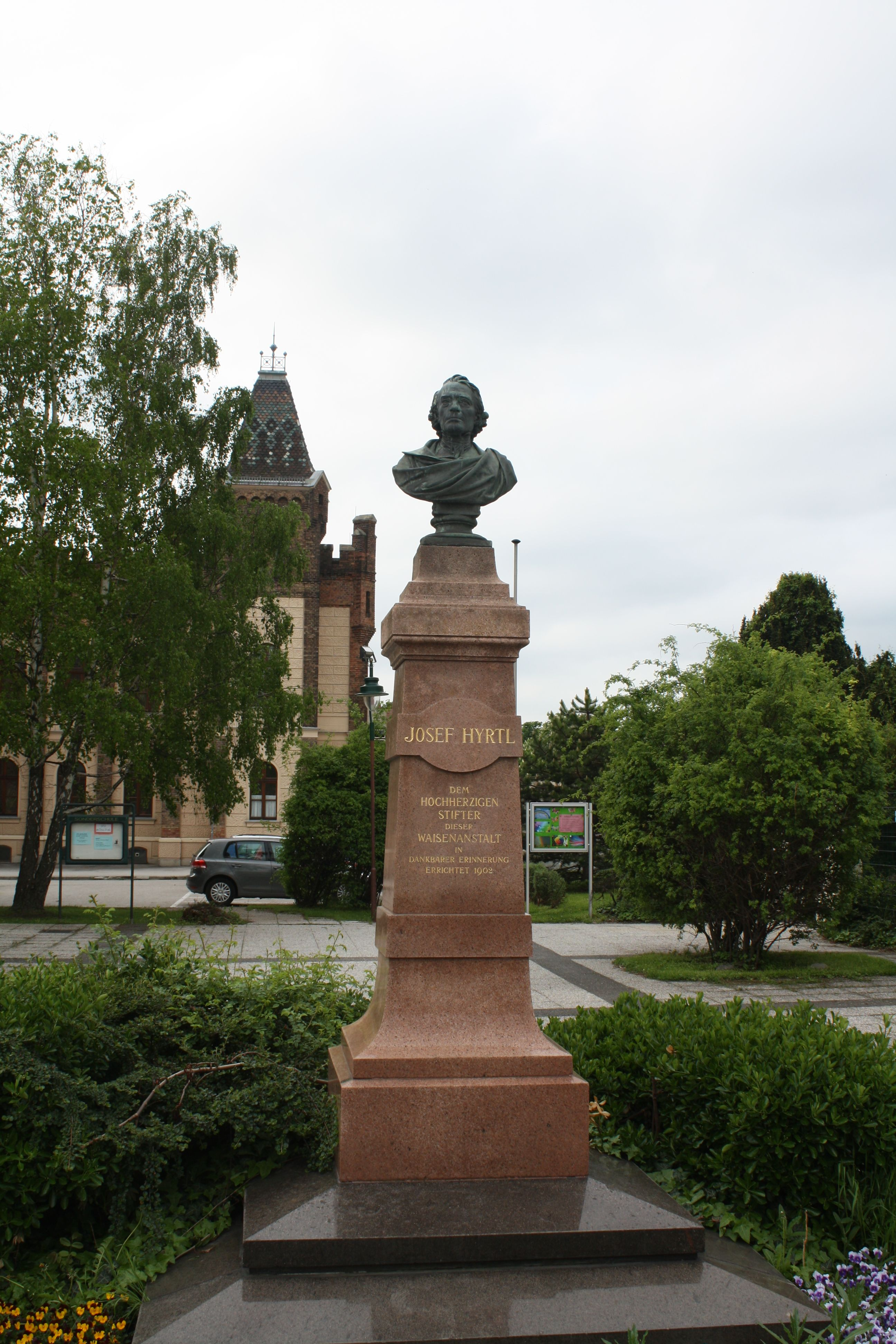 Hyrtldenkmal vor dem Waisenhaus in Mödling in Niederösterreich